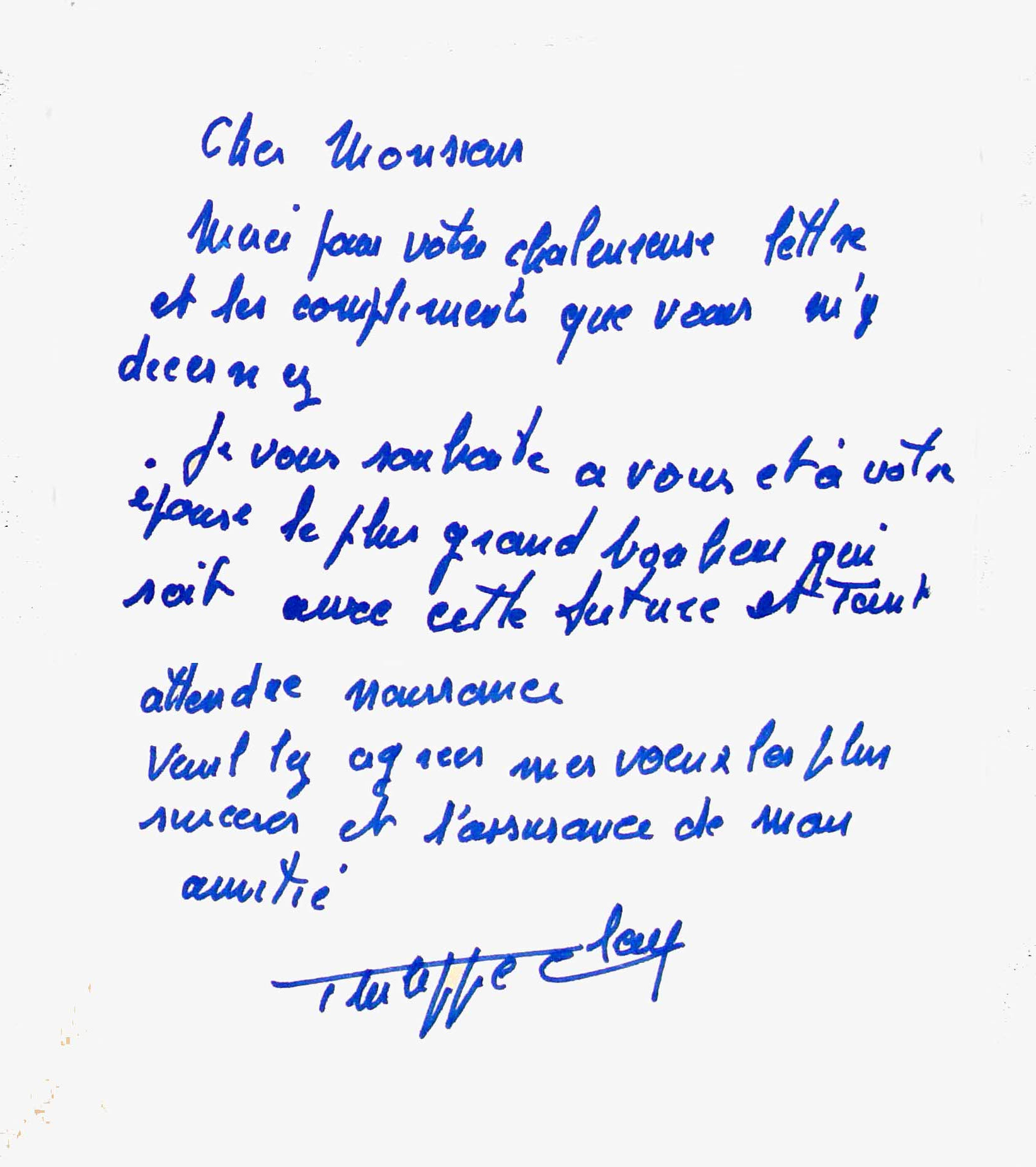 un des derniers courriers de Philippe Clay en 2007.